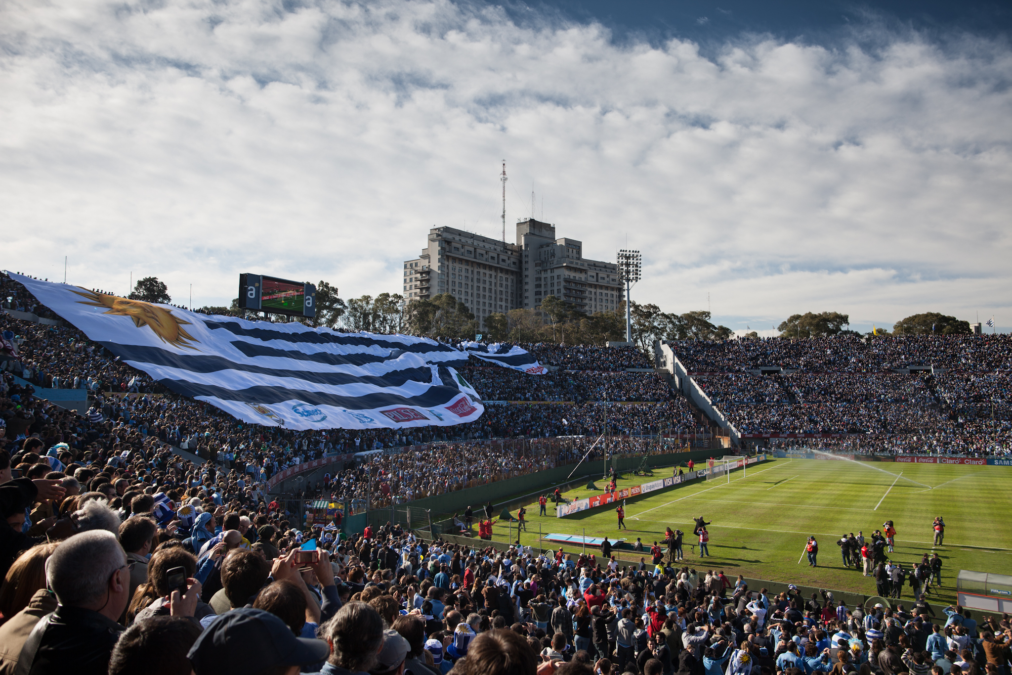 Bandera gigante de Uruguay